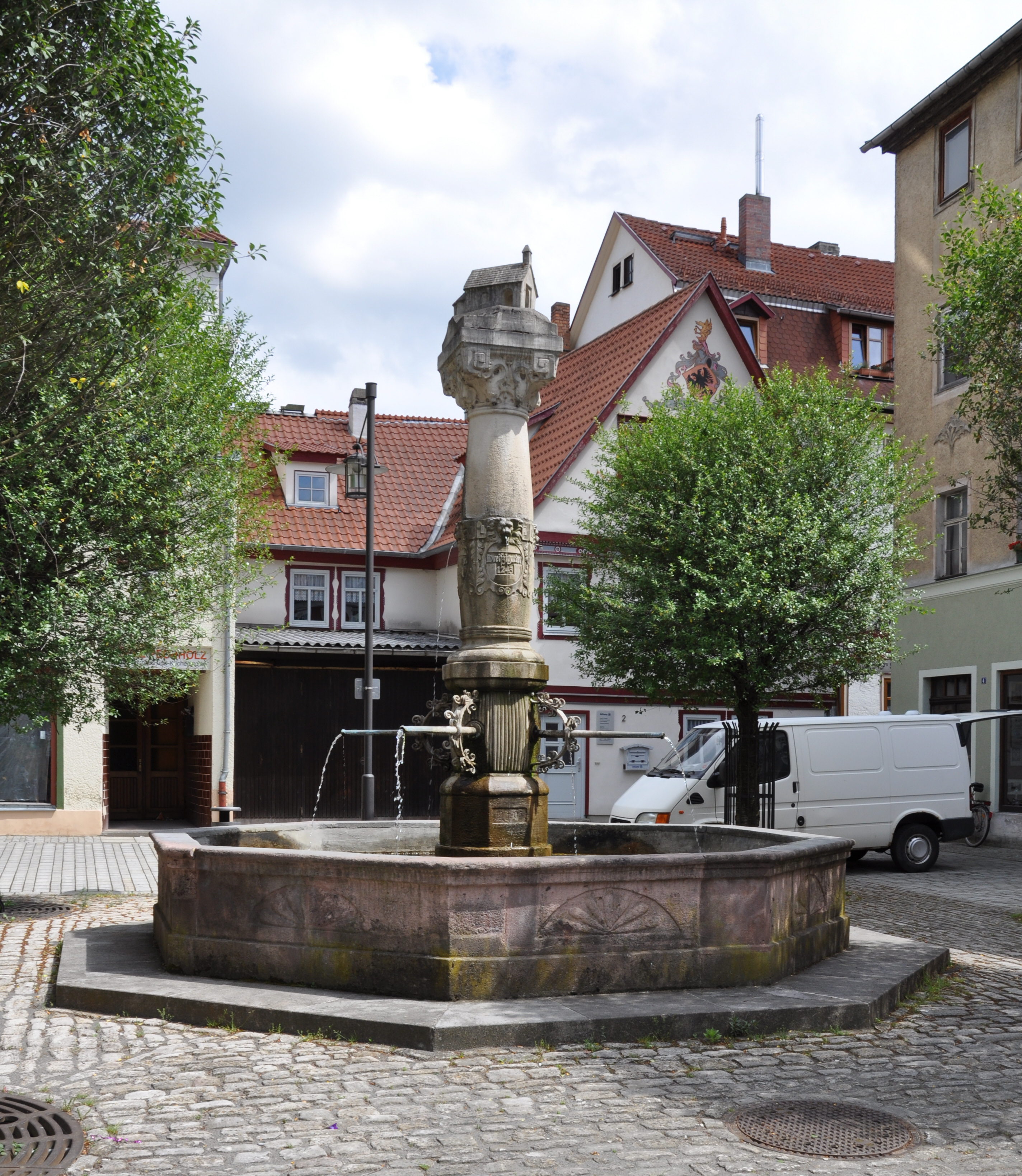 Meiningen, Kapellenbrunnen